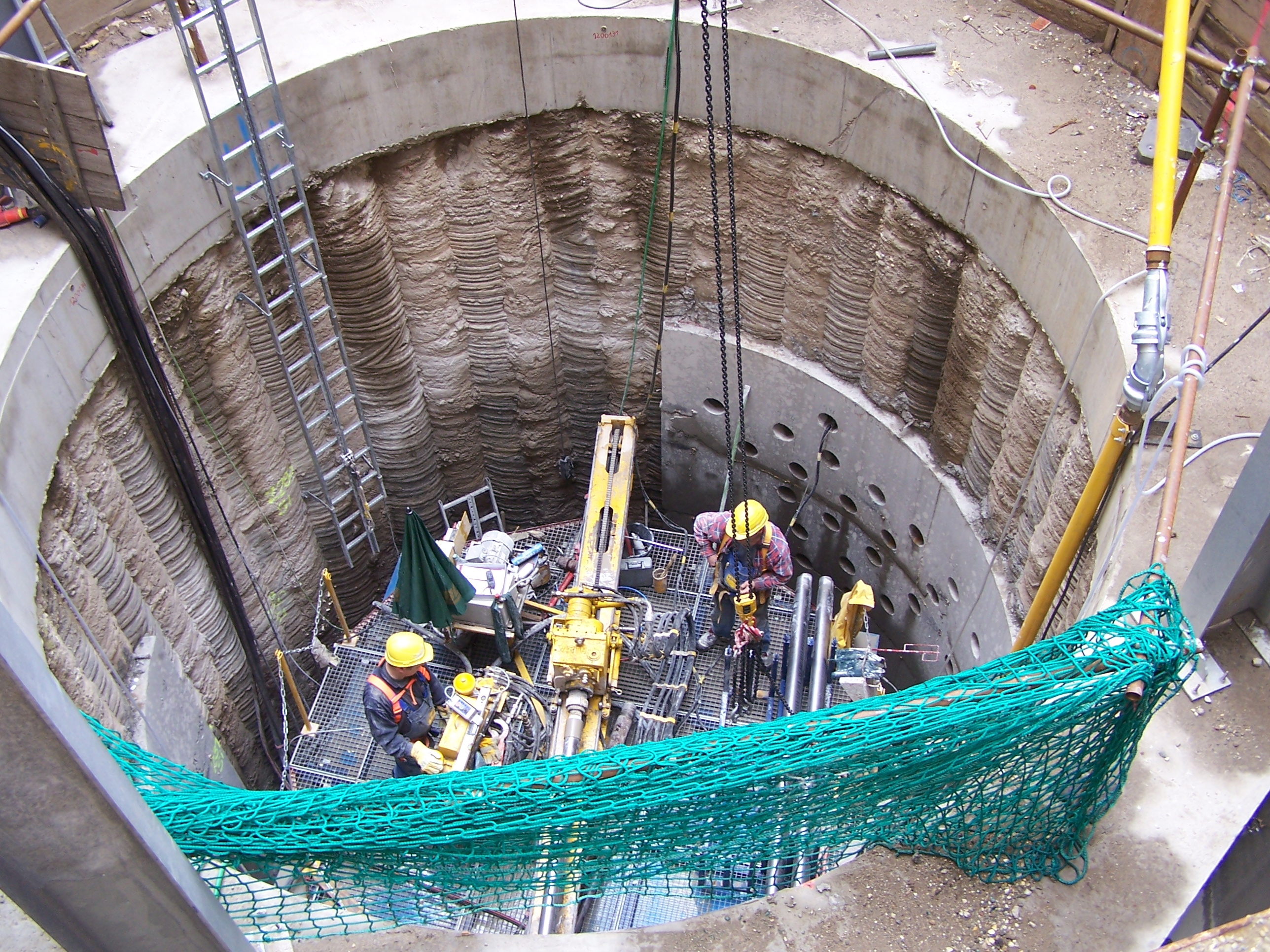 CGV-Schacht SA 2 Härtelstraße City-Tunnel Leipzig, Compensation-Grouting-Verfahren